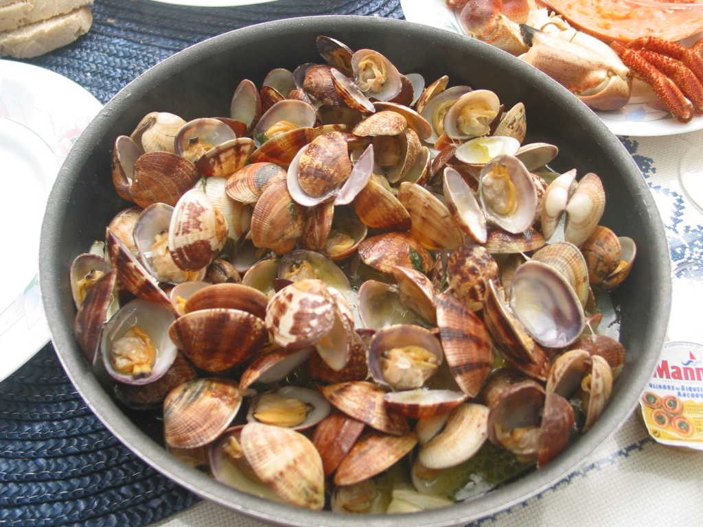 "Amêijoas à Bulhão Pato", um prato português. A portuguese clam dish.